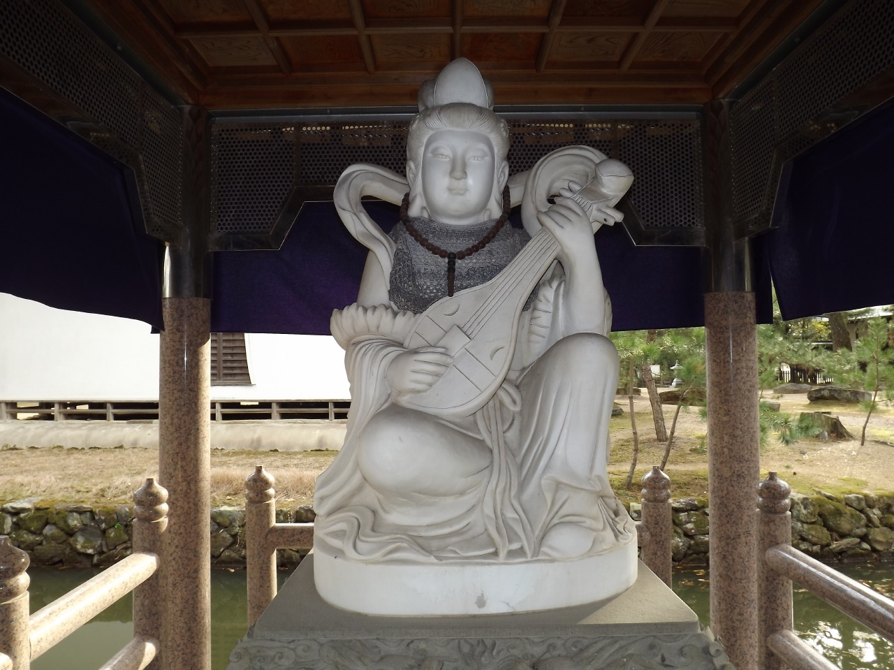 讃岐国分寺の弁財天